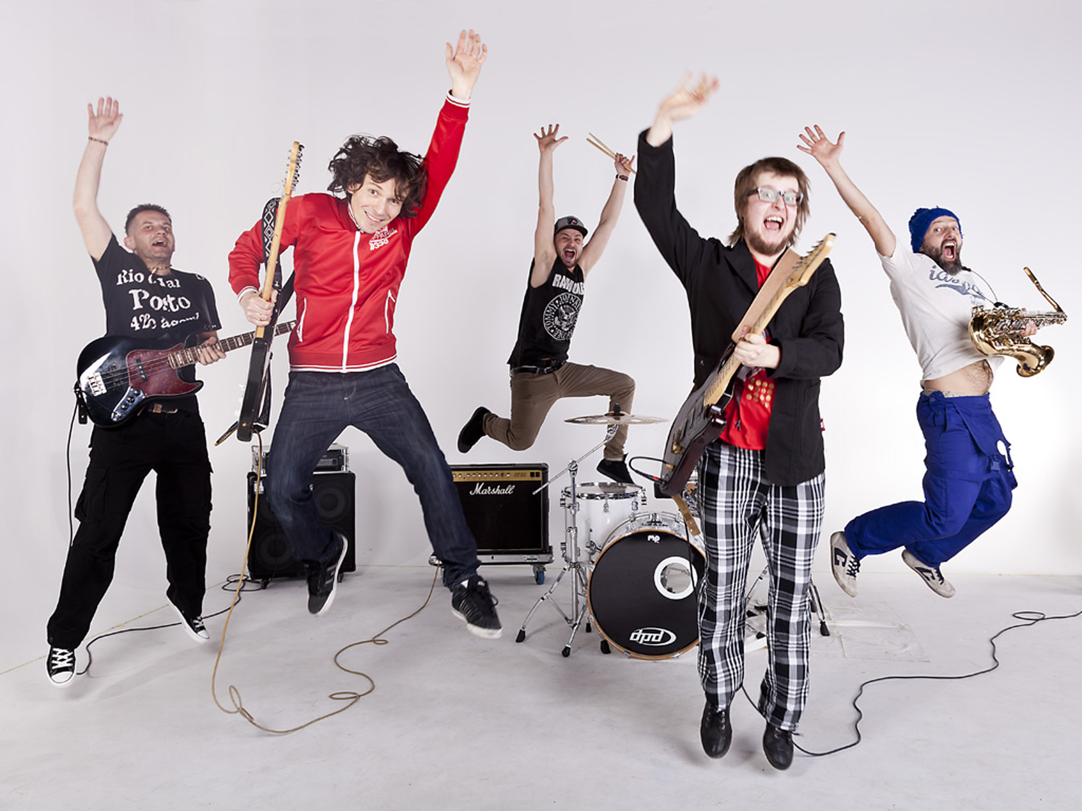 Akurat 2013